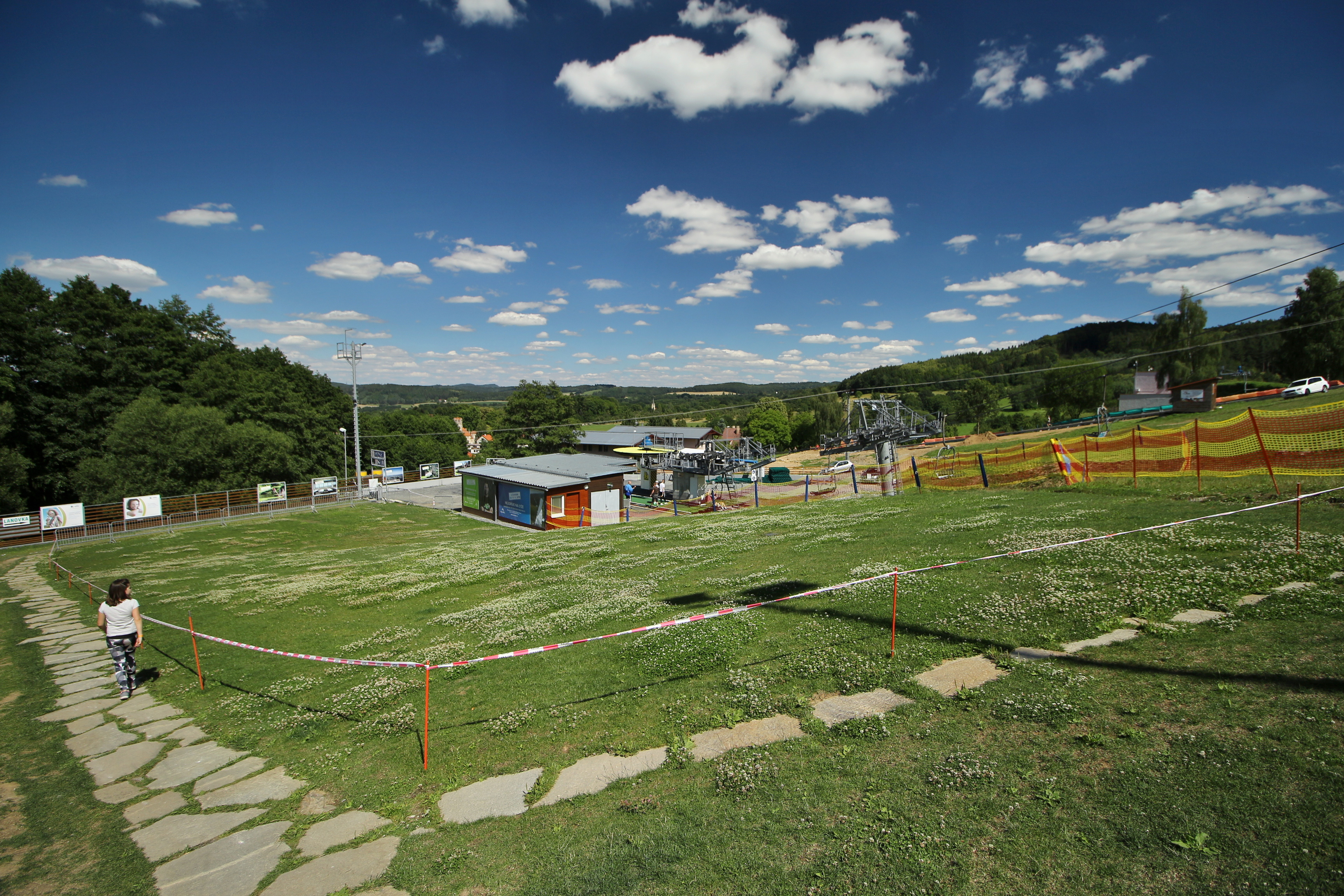 Ski resort Moninec